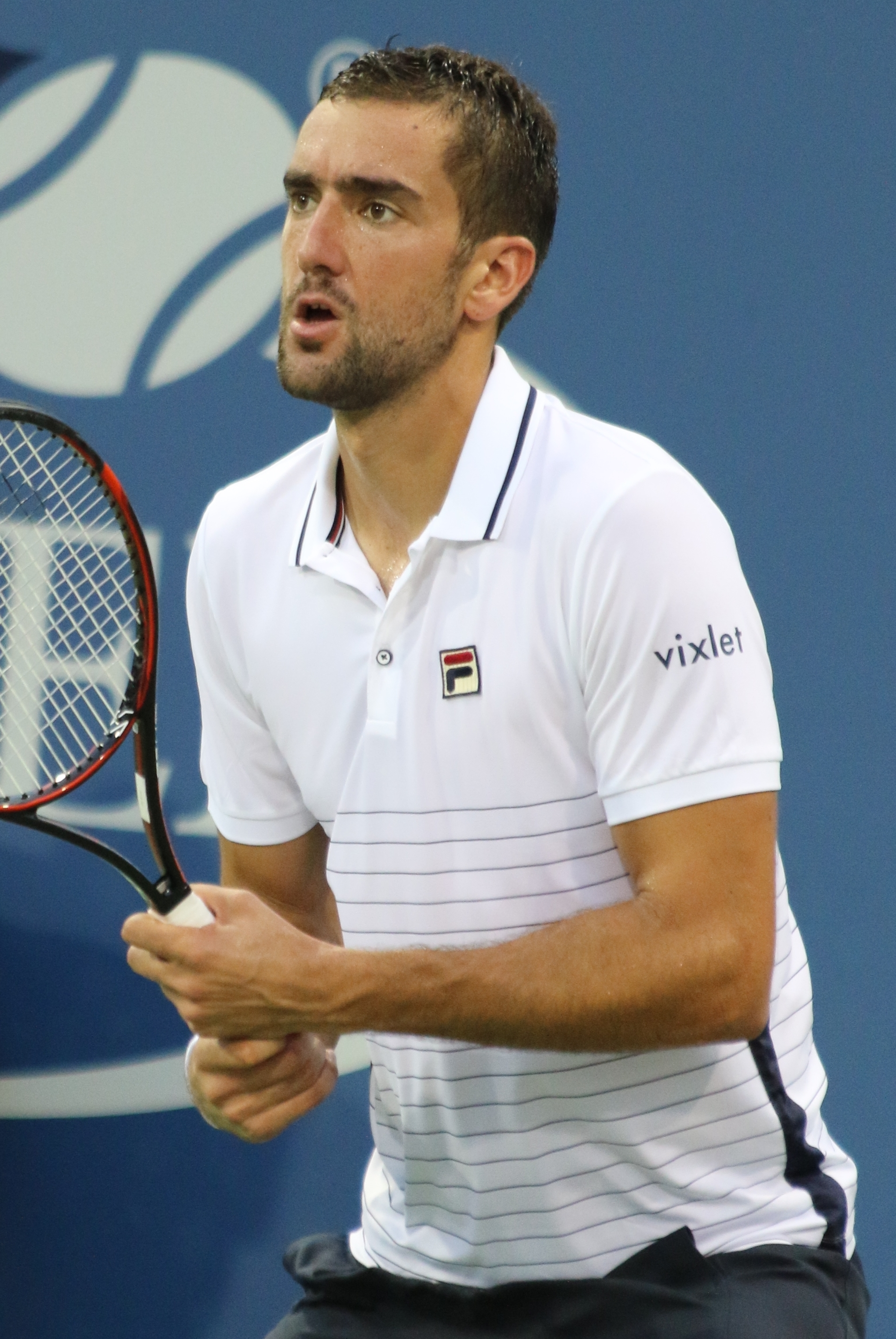 Cilic US16 (66)